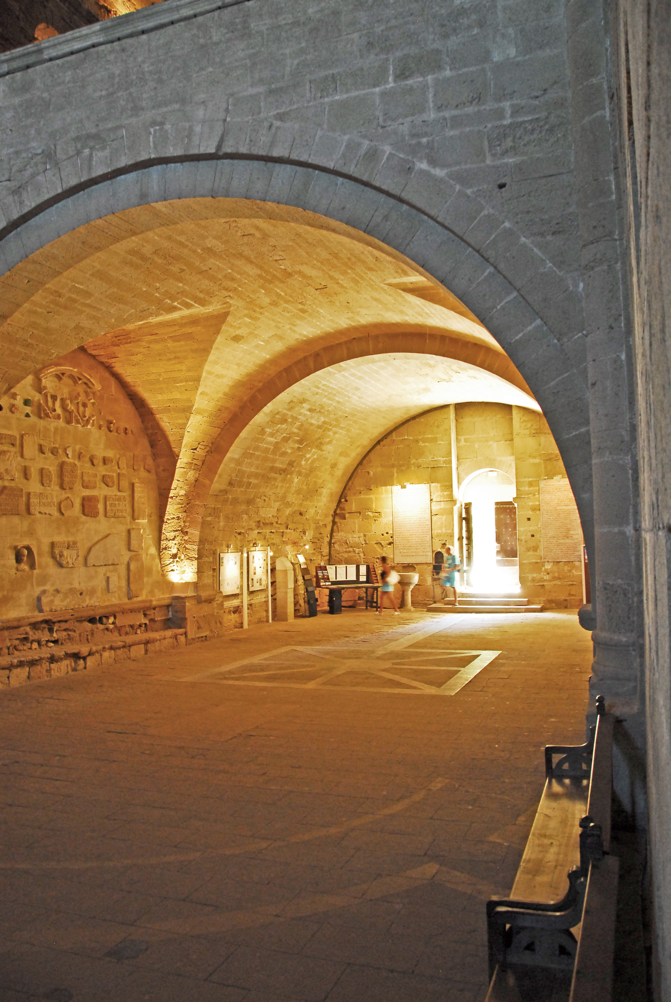 St-Pierre-et-St-Paul de Maguelone